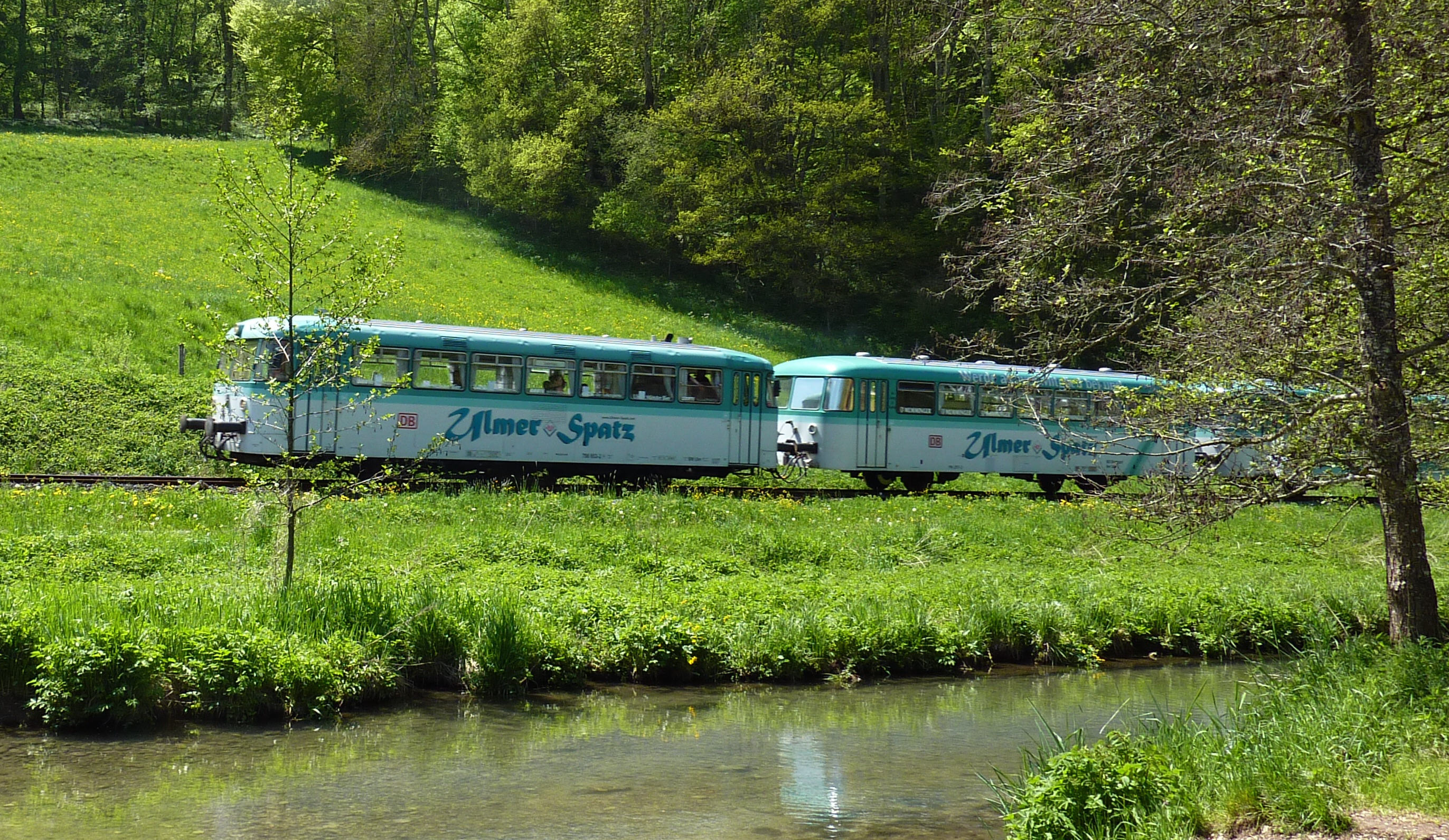 Ulmer Spatz jenseits der Lauter bei Marbach